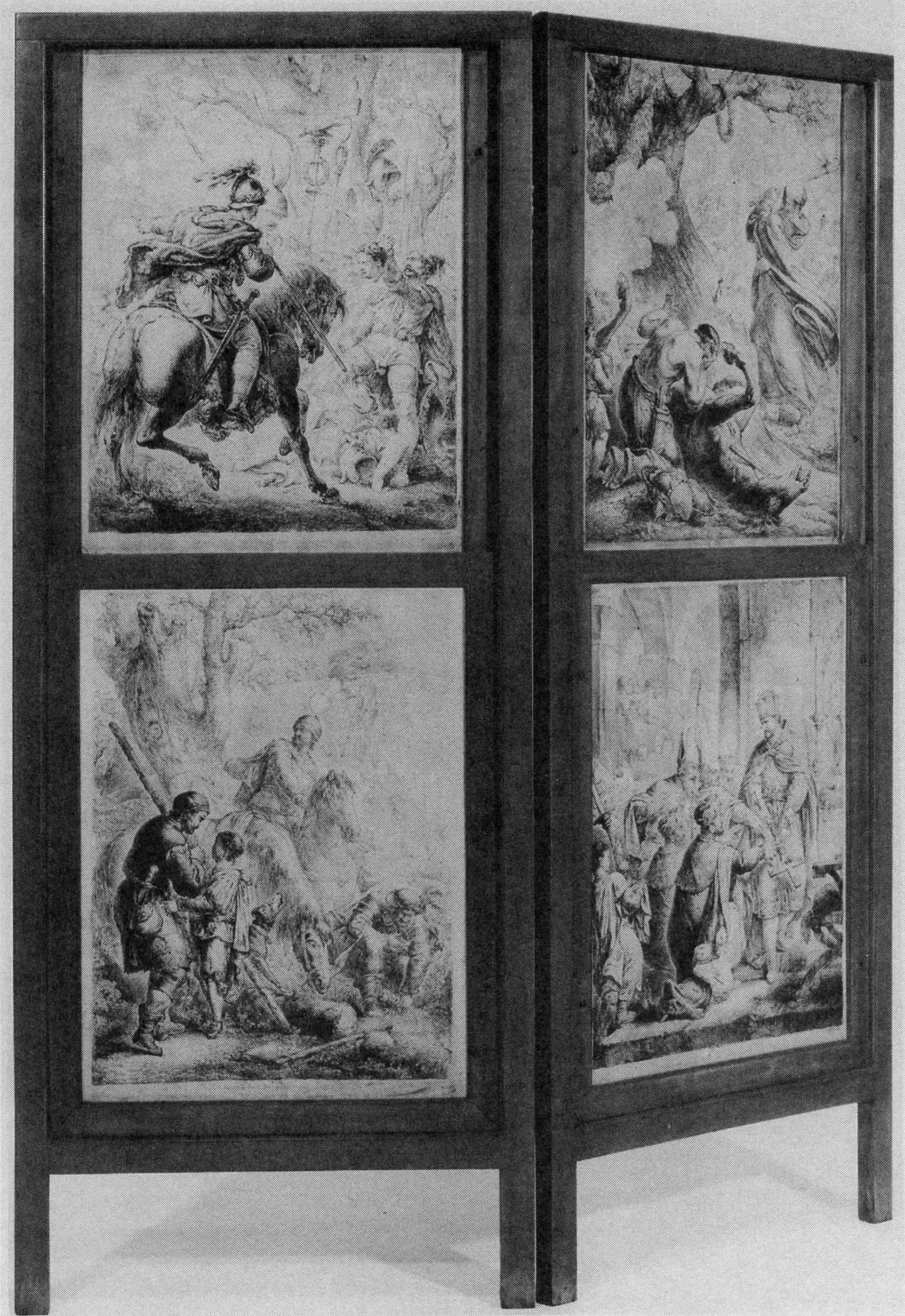 Kaminschirm, Gotisches Haus, Wörlitz. Christian Bernhard Rode, Radierungen, nach 1781 entstanden. Oben links: Arminius lässt den Kopf des Varus zu Marbod bringen. Oben rechts: Bonifatius fällt die Donareiche in Fritzlar. Unten links: Ein Köhler befreit den geraubten sächsischen Prinzen. Unten rechts: Rudolf von Habsburg ergreift beim Eid der Treue das :statt des Zepters.